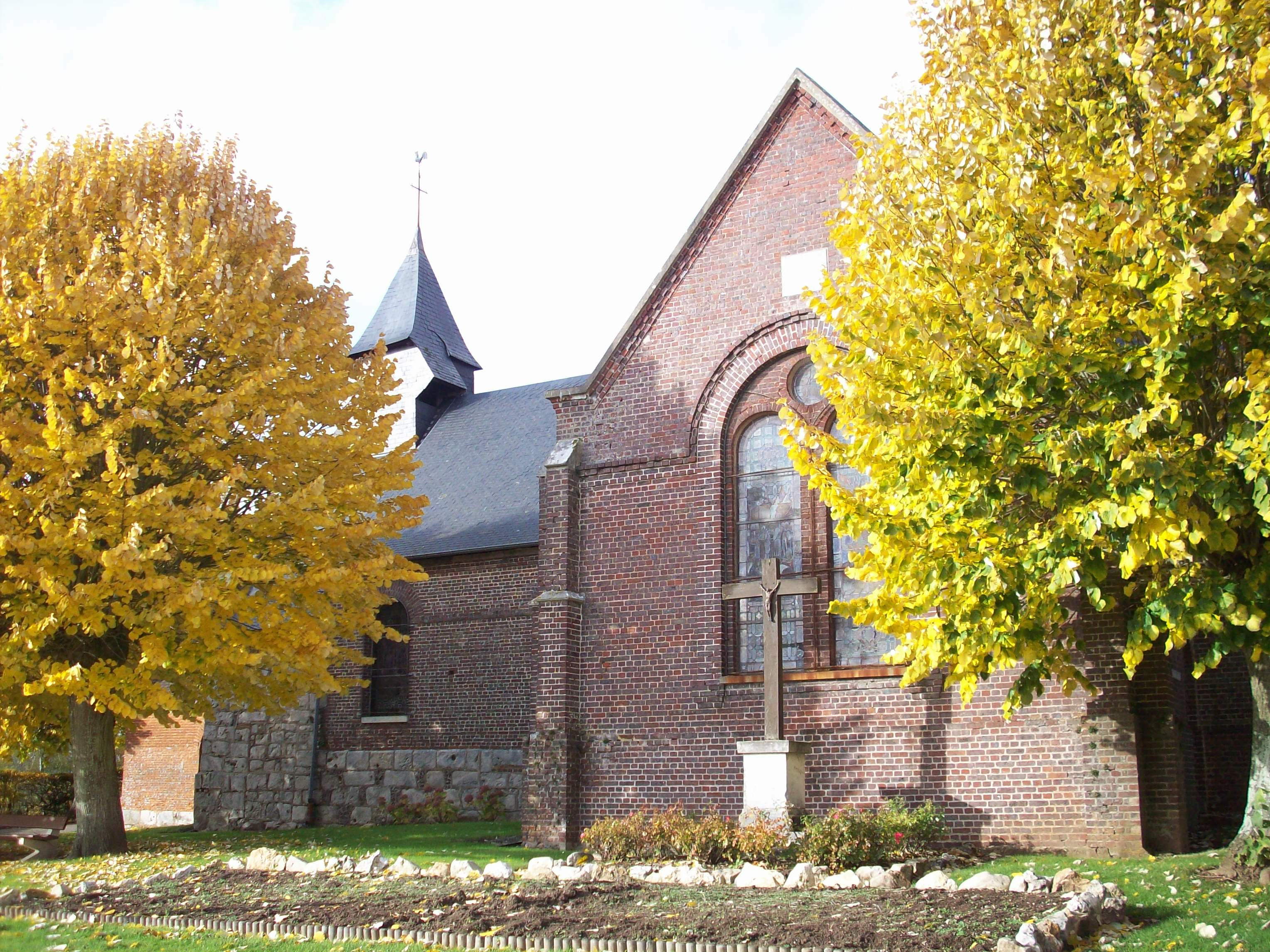 Eglise Saint-Mathurin des Hogues.